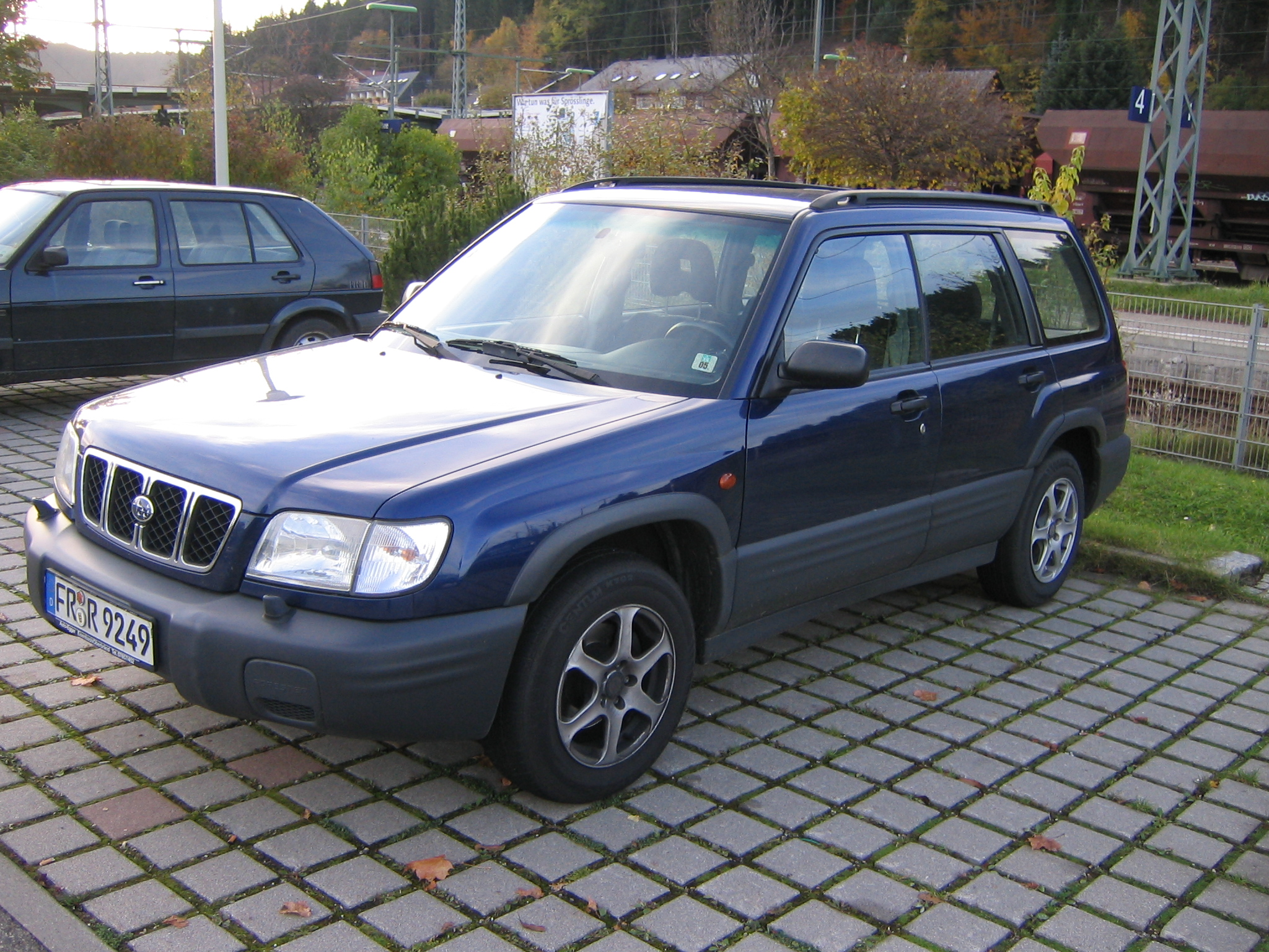 Subaru Forrester